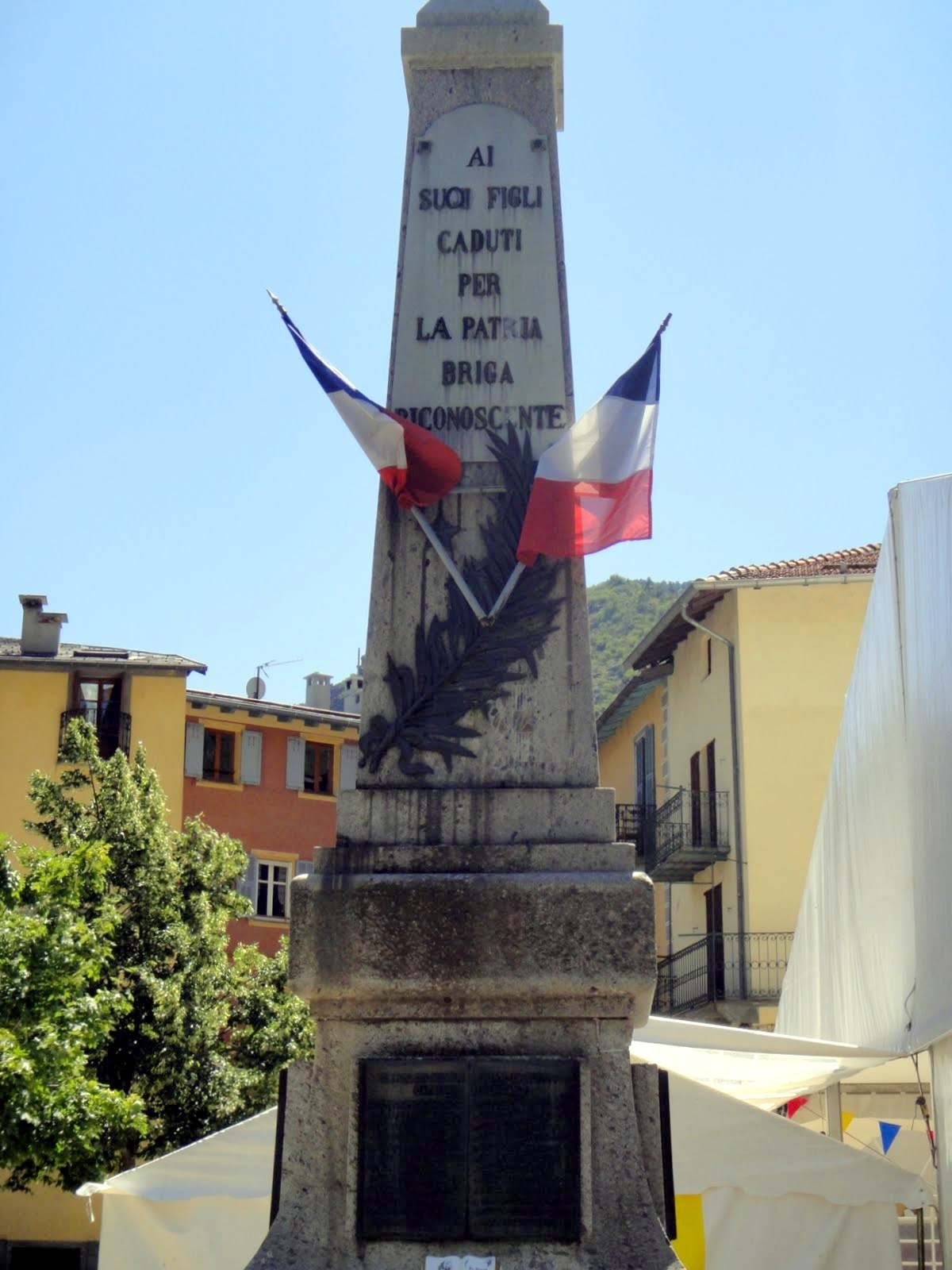 monument aux morts italiens pavoisé du drapeau français